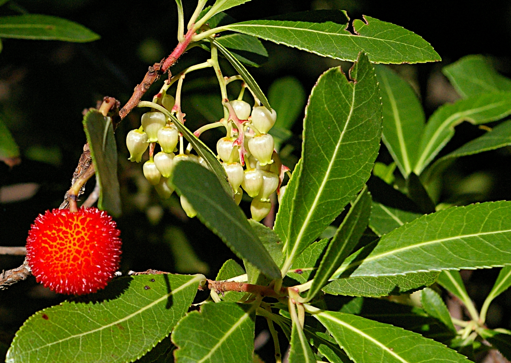 Arbutus unedo, Saint Guilhem le désert, Hérault, France